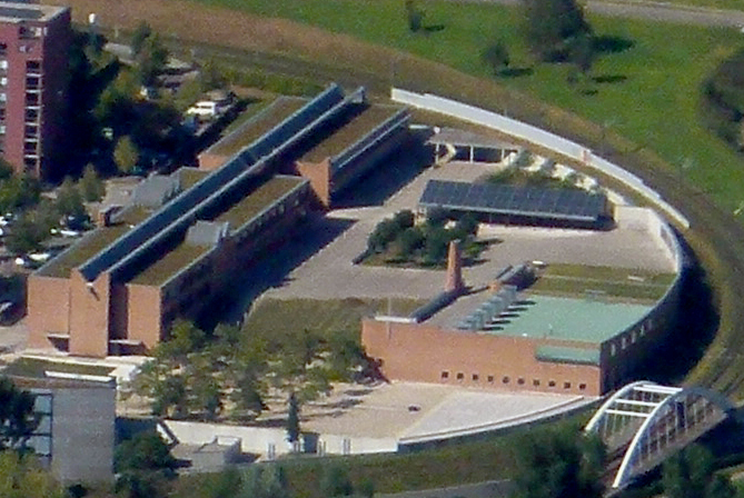 Blick auf die Schule im Park im Scharnhauser Park vom Flugzeug, Ostfildern